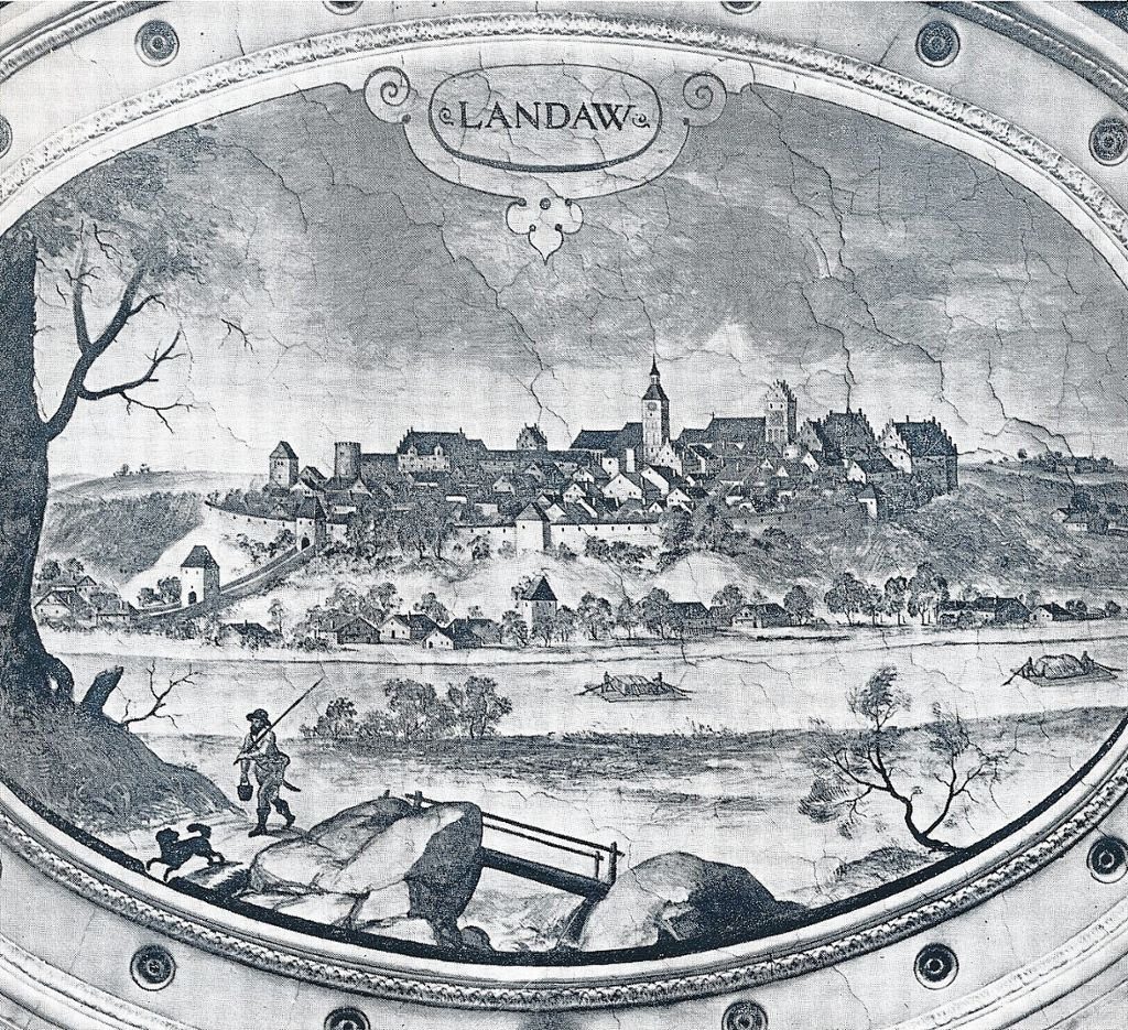 Älteste Ansicht von Landau an der Isar, Niederbayern. Fresko in dem Antiquarium der Münchner Residenz erhalten. Das Stadtbild prägen die Vorgängerkirche der jetzigen Pfarrkiche mit einem Sattelturm mit Stufengiebel, der wuchtige Rathausturm und als Bastion der Stadtbefestigung, der herzogliche Kastenhof